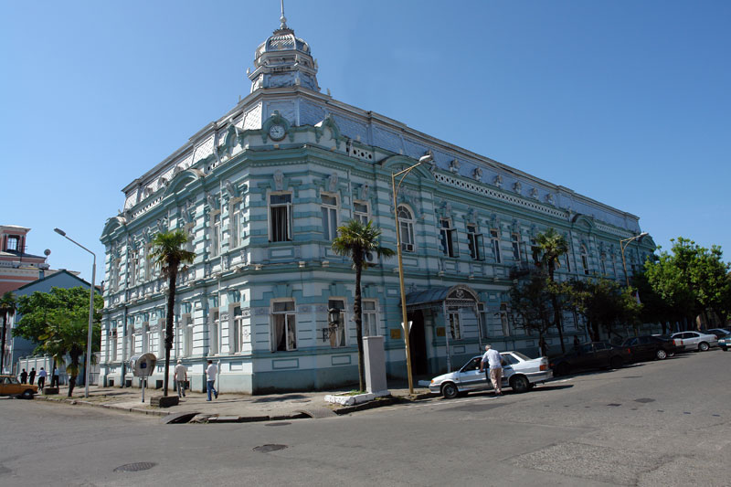 Batumi, Georgia